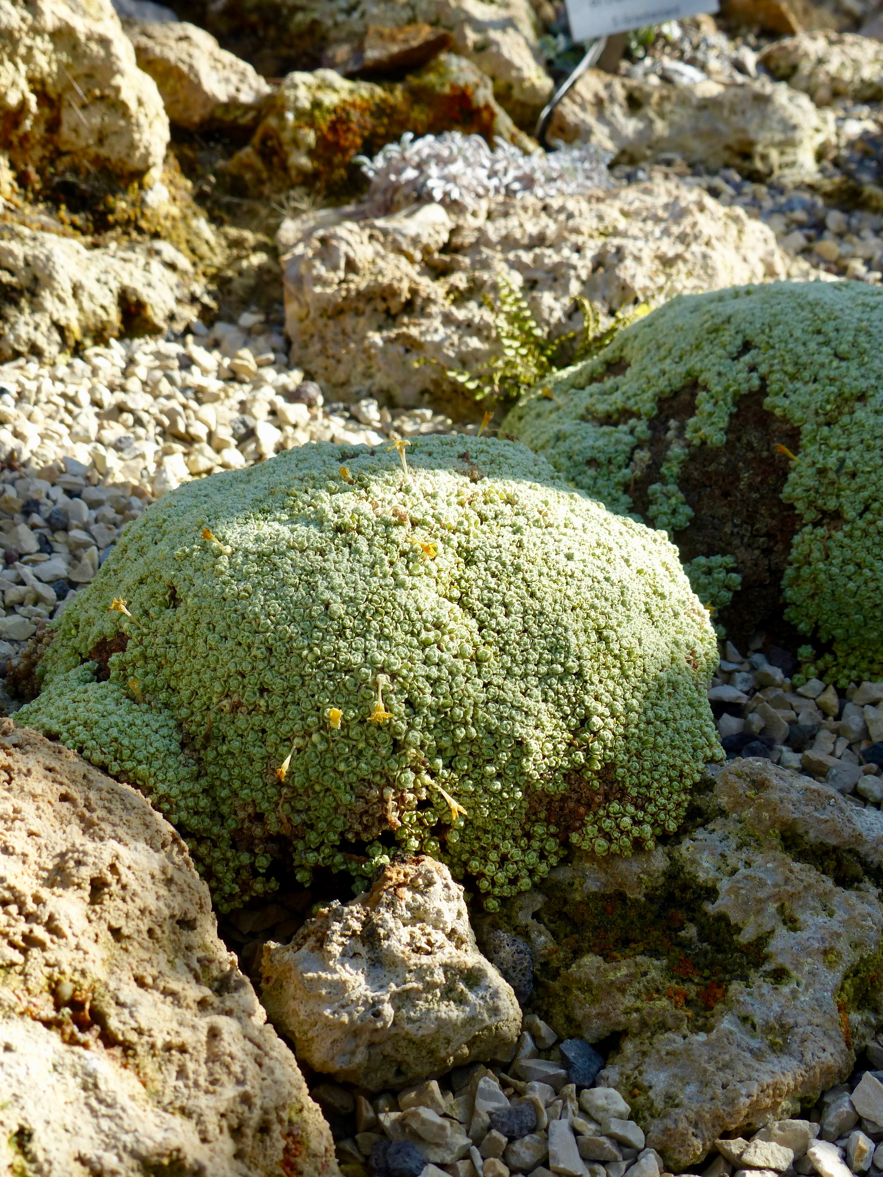 Führung und Fotoexkursion in den Botanischen Garten München-Nymphenburg im Rahmen des WikiAlpenforums: Dionysia tapetodes im Alpinpflanzengewächshaus